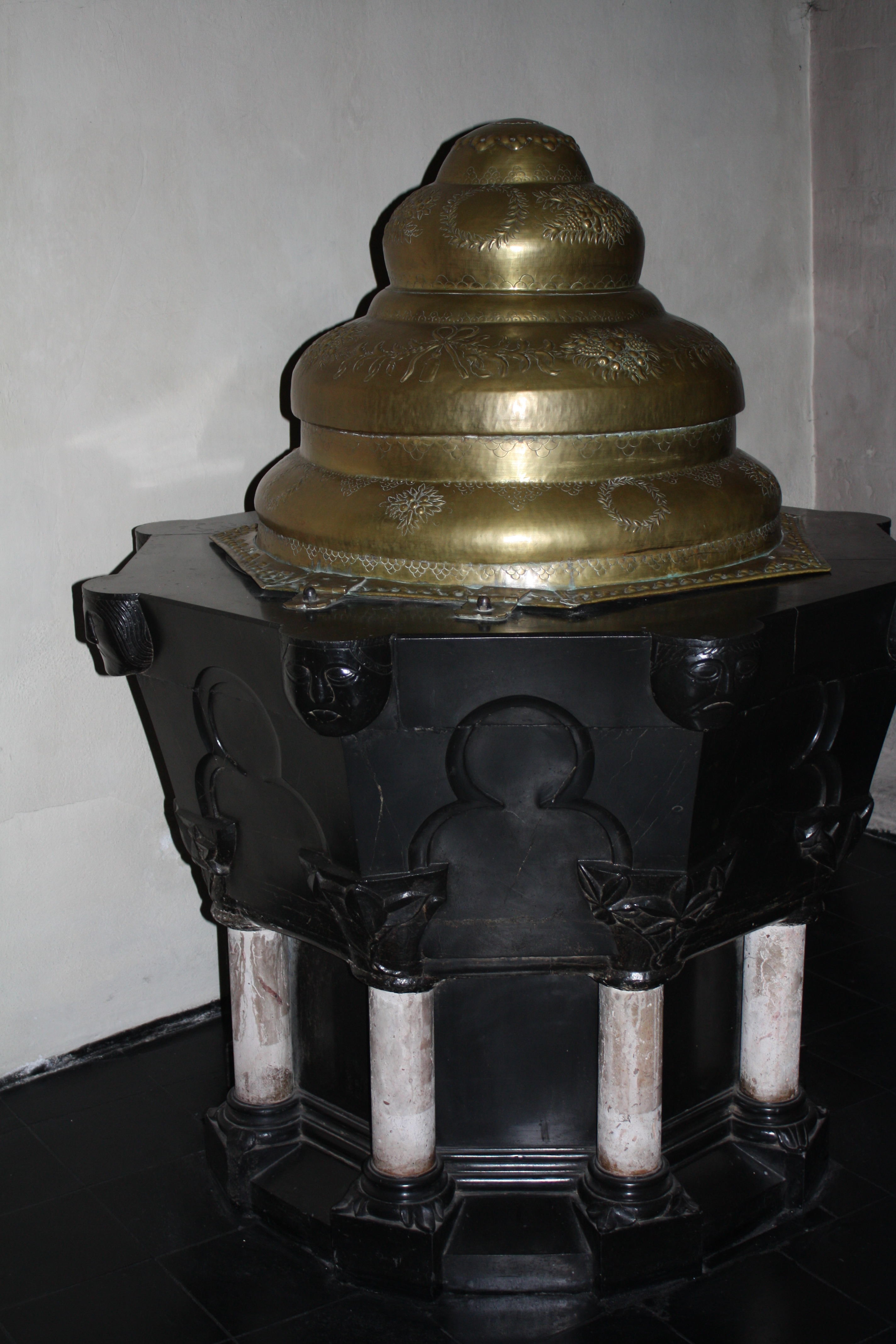 St. Maria Lyskirchen Köln. Der Taufstein aus der Frühzeit der staufischen Kirche entstammt in Teilen dem Ende des 13. Jahrhunderts